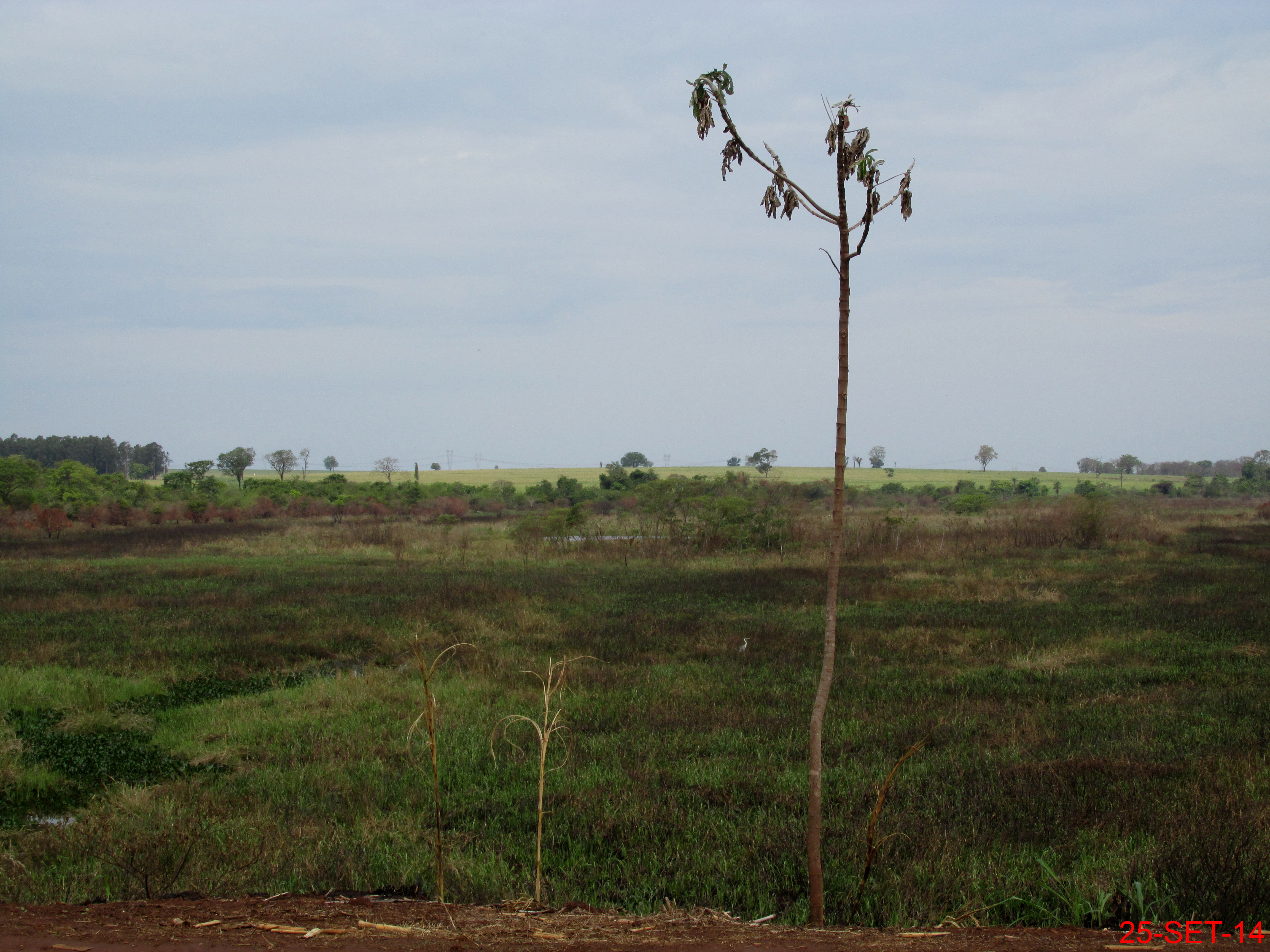 Área de várzea do Rio Pardo após a ponte, vendo o estrado das queimadas nesta época de seca.